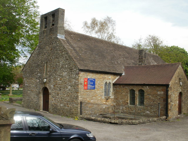 Aberdare, Rhondda, Wales